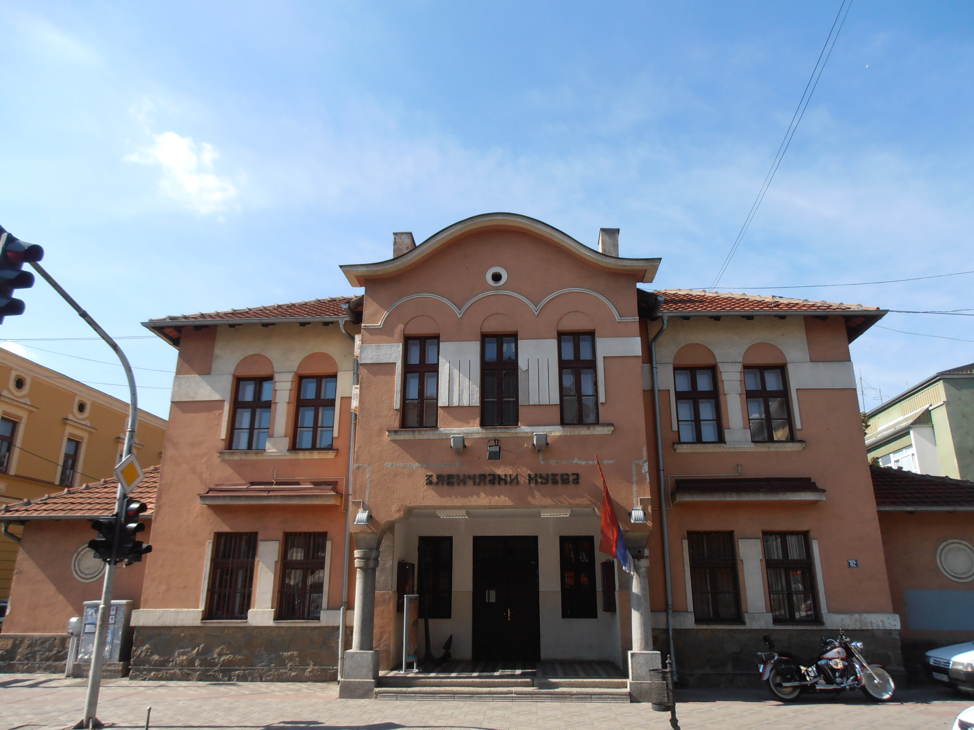 Зграда Завичајног музеја у Јагодини, некадашњи Соколски дом